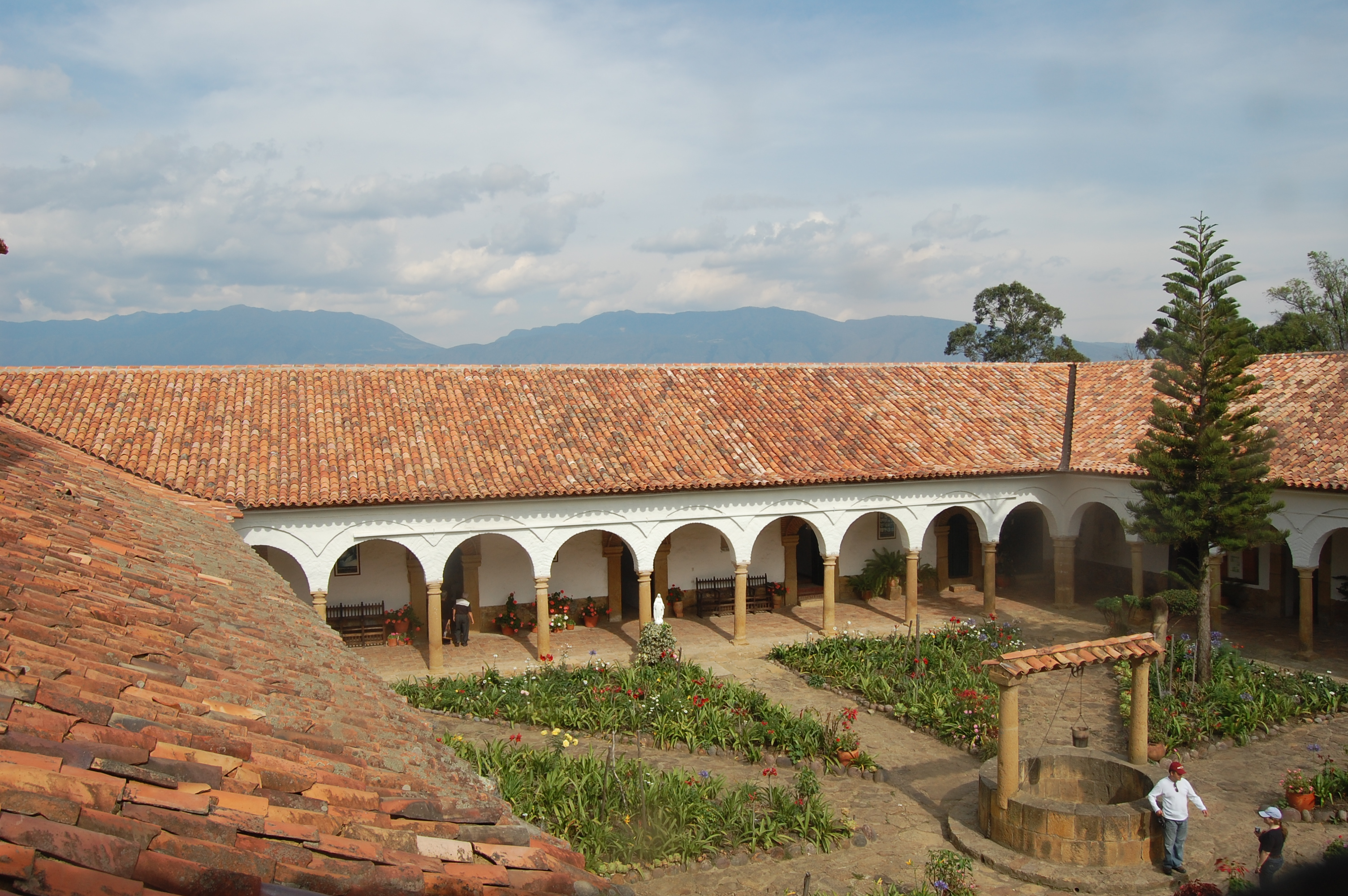 Monasterio Santo ecce-homo, Villa de Leyva, Boyacá, Colombia